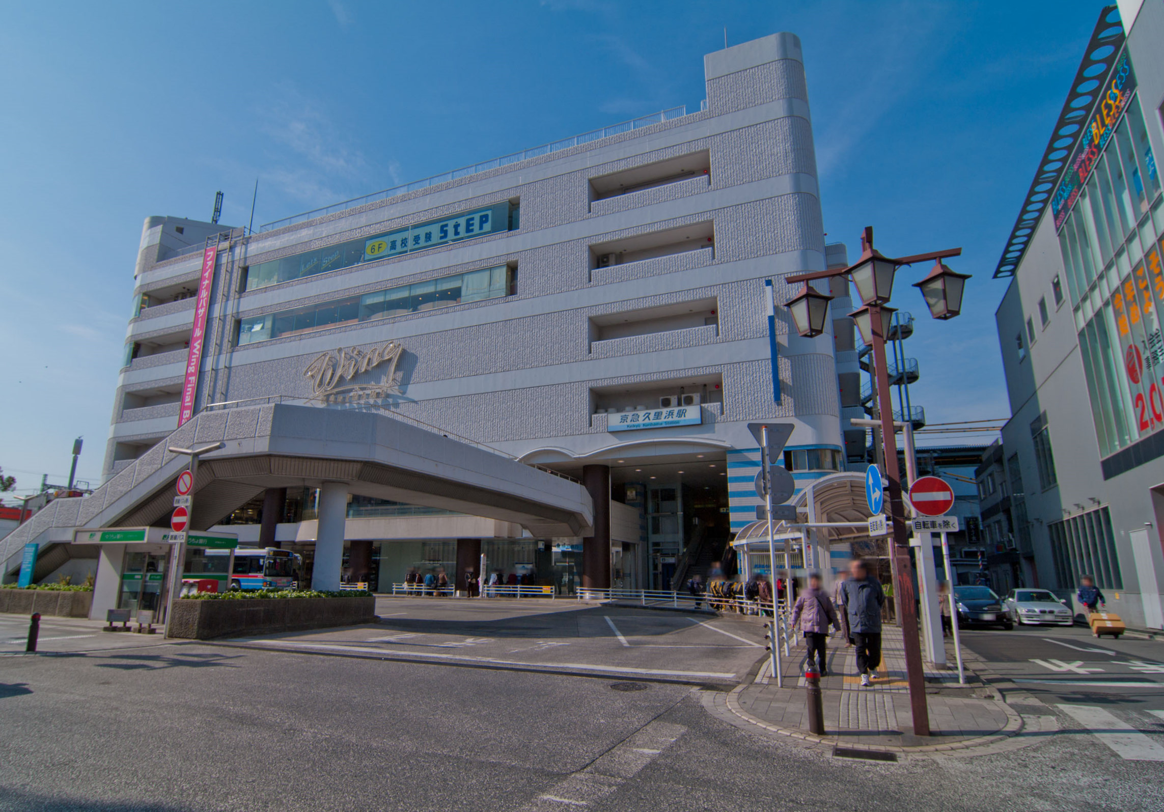 京浜急行電鉄久里浜線久里浜駅